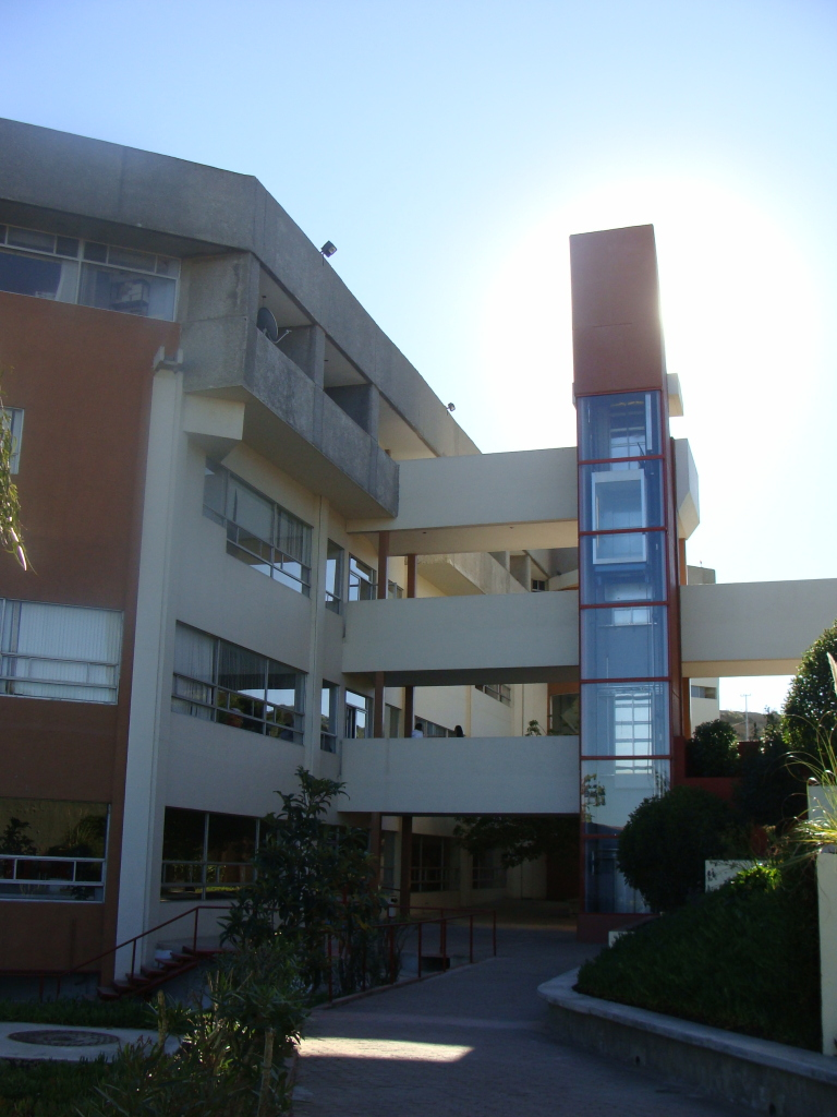 Universidad Iberoamericana Tijuana, ubicada en Tijuana Baja California, México y parte del Sistema Universitario Jesuita.